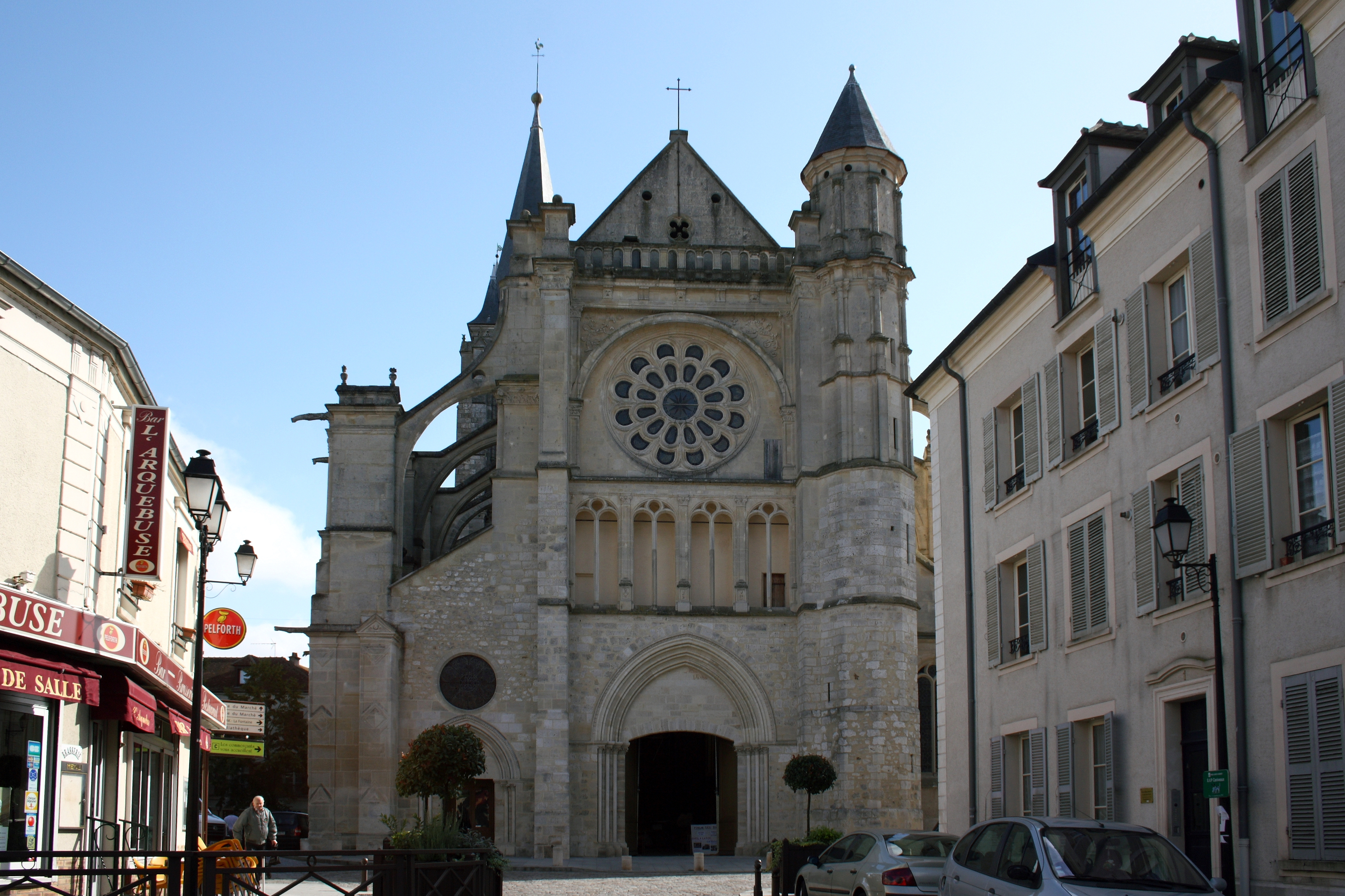 Katholische Pfarrkirche Saint-Étienne in Brie-Comte-Robert im Département Seine-et-Marne in der Region Île-de-France (Frankreich), Westfassade Object location48° 41′ 25.08″ N, 2° 36′ 30.6″ E